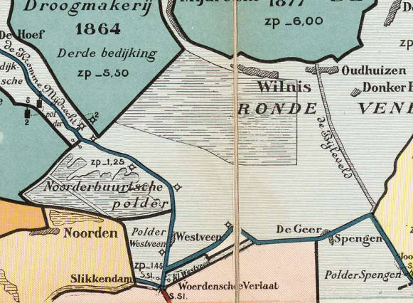 Noordse buurt polder